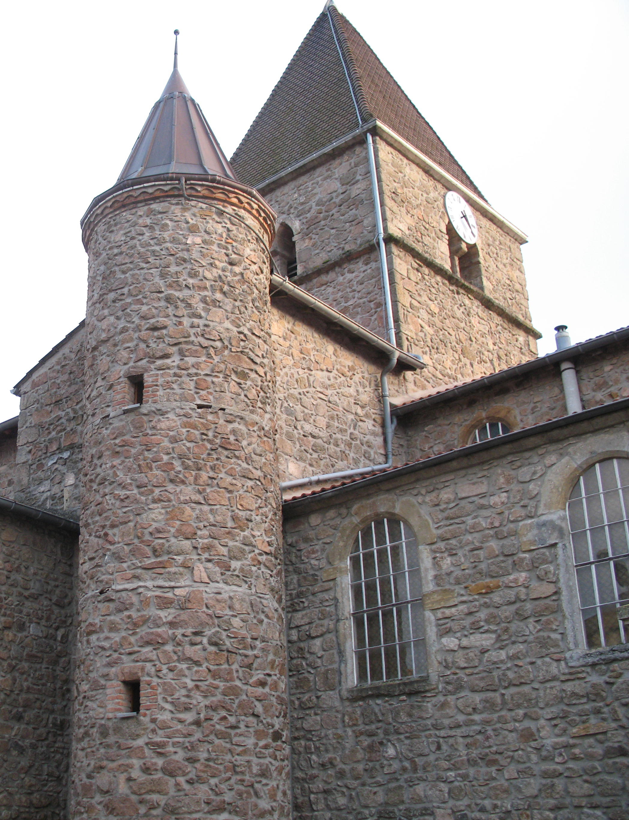 Eglise de Saint-Jacques-des-Arrêts